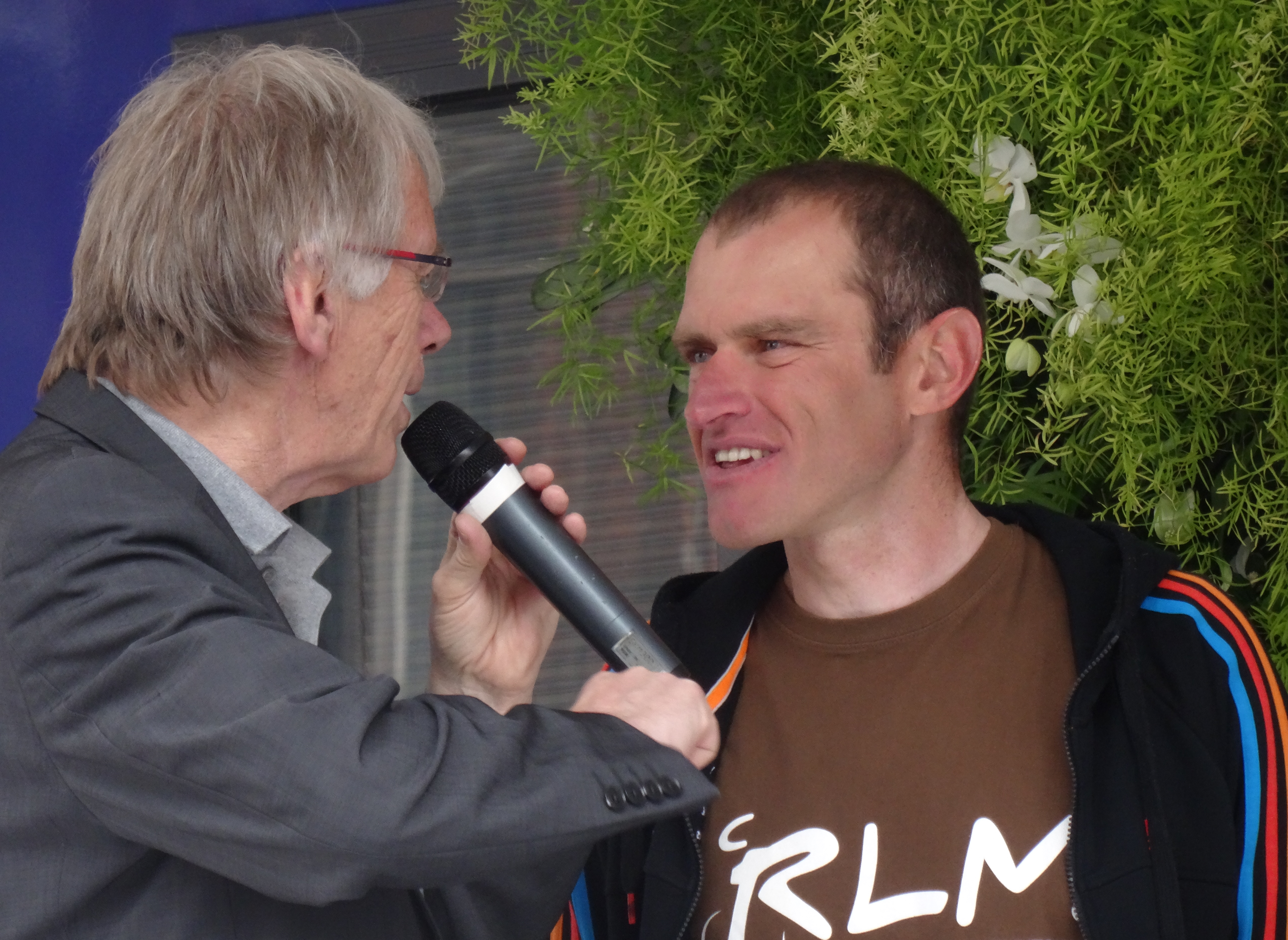 Reportage photographique réalisé le dimanche 25 mai 2014 à l'occasion du départ et de l'arrivée de la troisième étape du Paris-Arras Tour 2014 à Arras, Pas-de-Calais, Nord-Pas-de-Calais, France. Depicted people: Daniel Mangeas and Franck Vermeulen